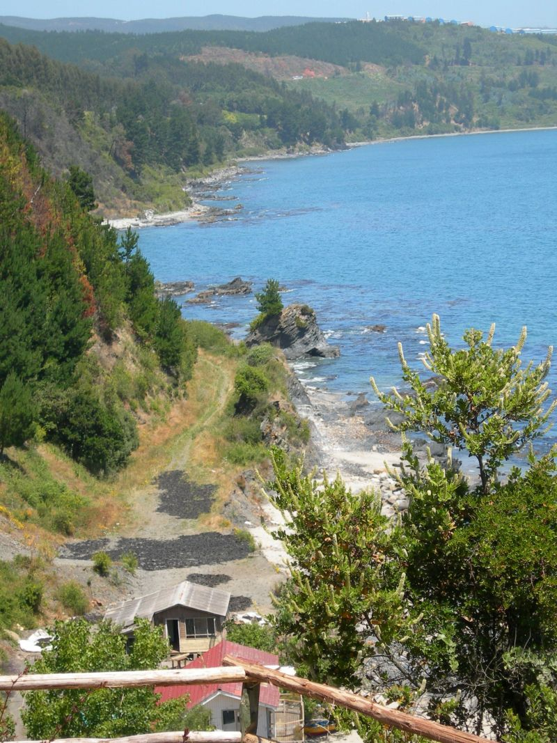 Playa de Punta de Parra